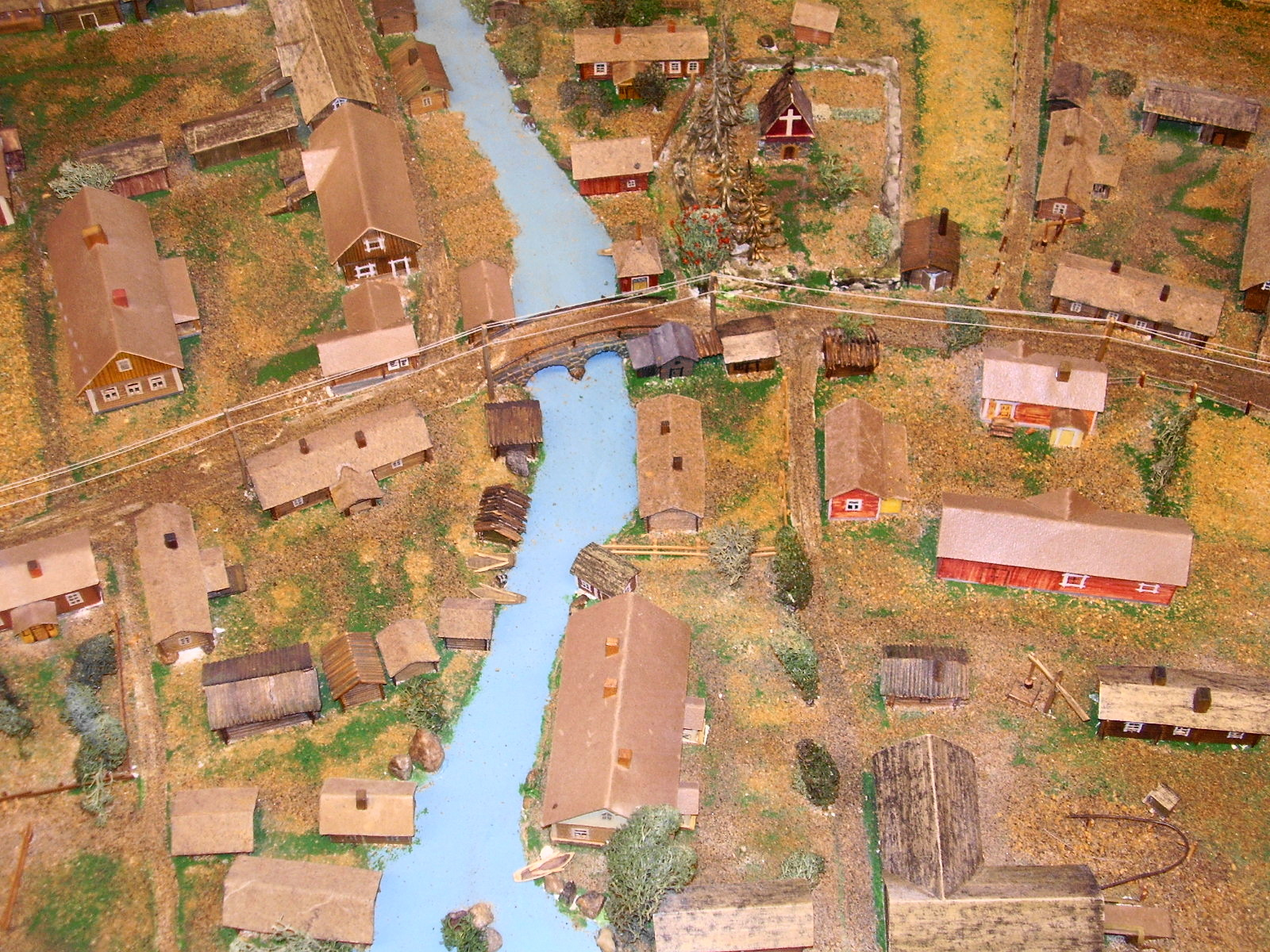 Ryhmäkylä joen ympärillä 1920-luvulla.